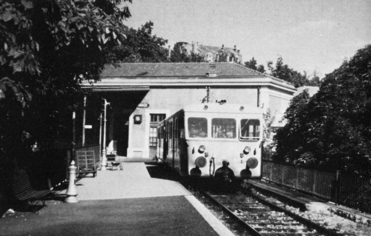 Chemins de fer de l'Hérault - Scan d'une photo de la voie unique de la gare de l'Esplanade. L'autorail De Dion-Bouton Z-701 et sa remorque R-1 sont dans l'attente du départ de 10 heures pour Palavas.